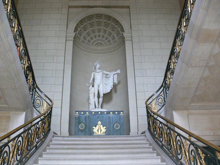 Compiègne, France: Château de Compiègne Les appartements historiques Escalier